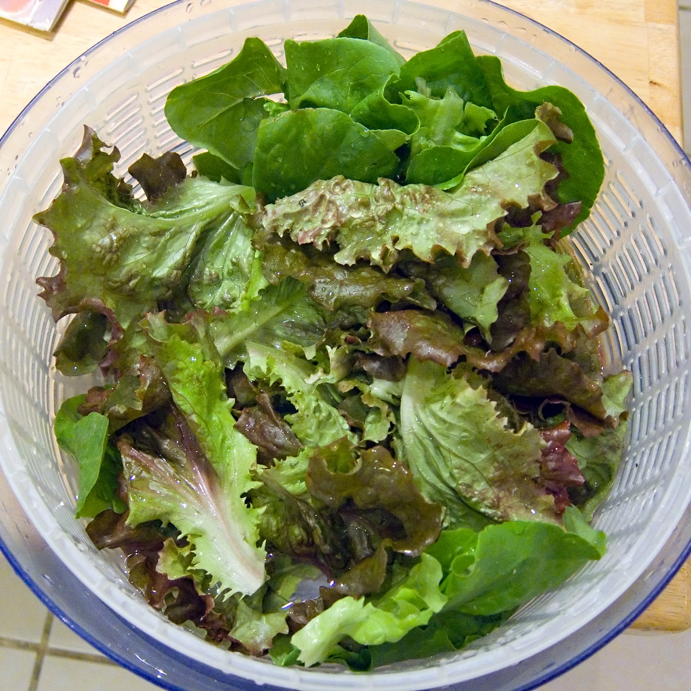 Lettuce in salad spinner.